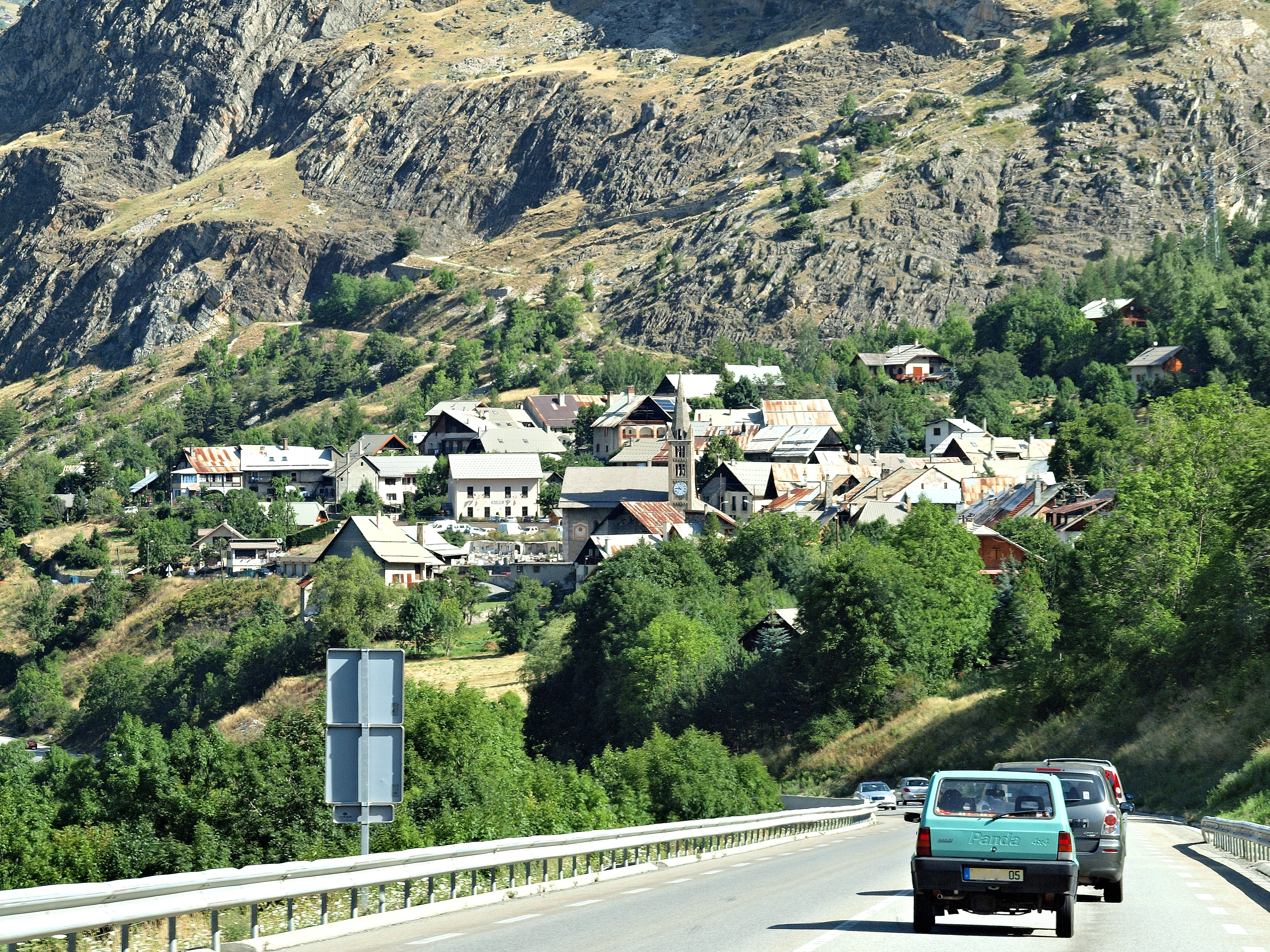 Saint-Martin-de-Queyrières (Hautes-Alpes) vu depuis la route nationale 94